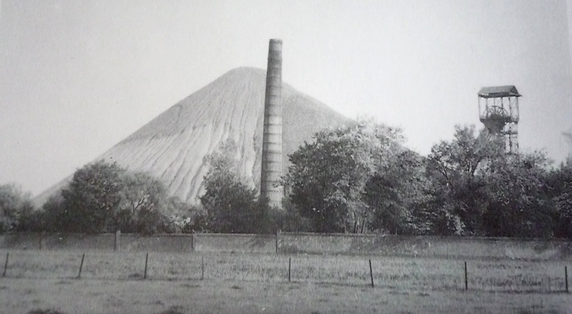 La Fosse n° 3 de la Compagnie des mines d'Azincourt était un charbonnage constitué d'un seul puits situé à Monchecourt, Nord, Nord-Pas-de-Calais, France.